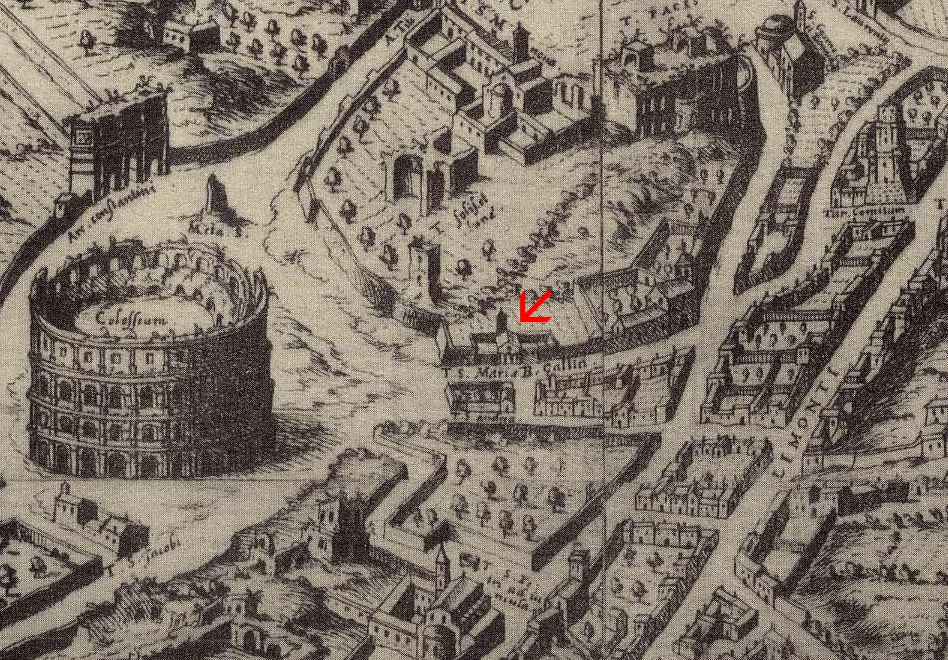 Pianta di Dupérac